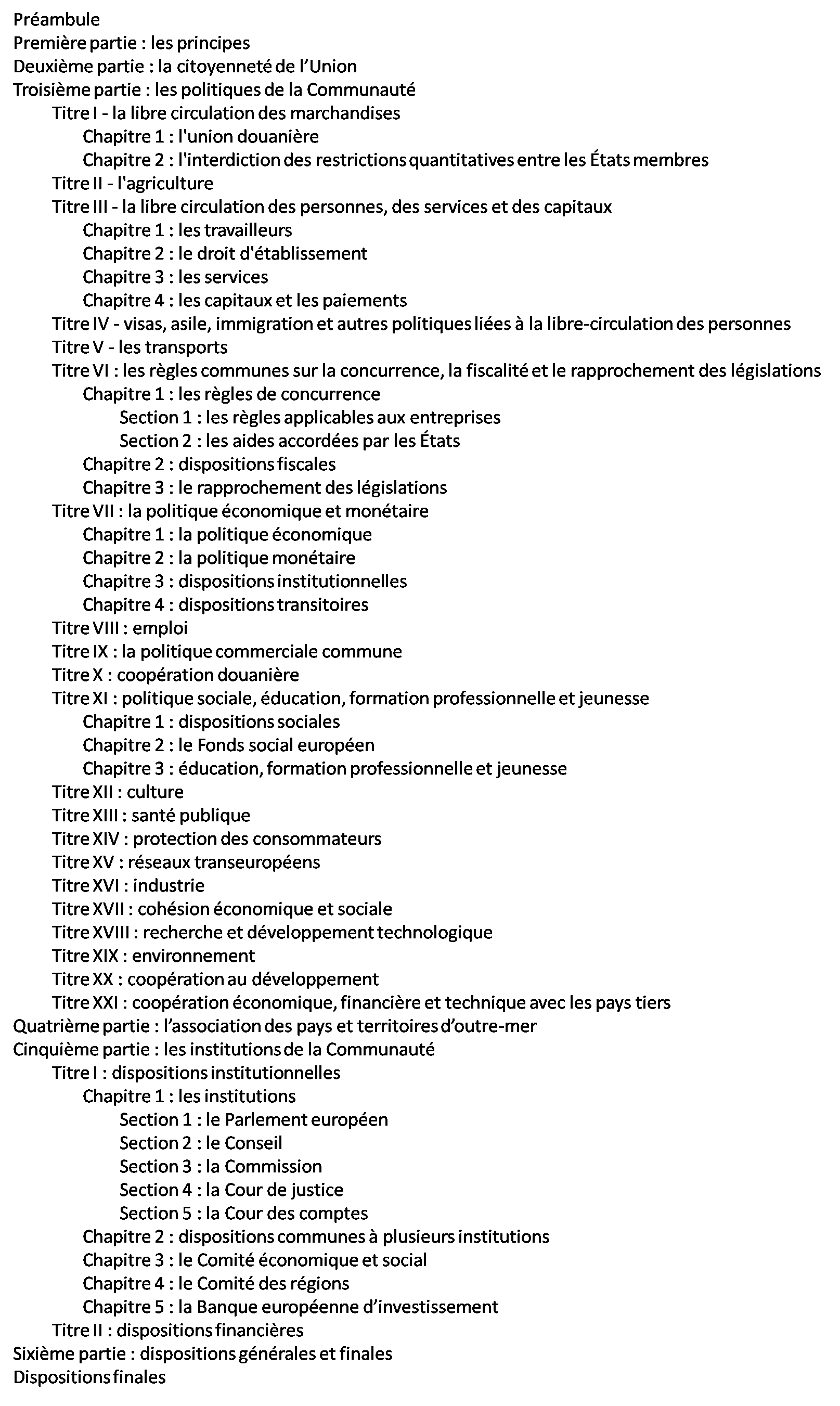 Plan du traité instituant la Communauté européenne en 2002.